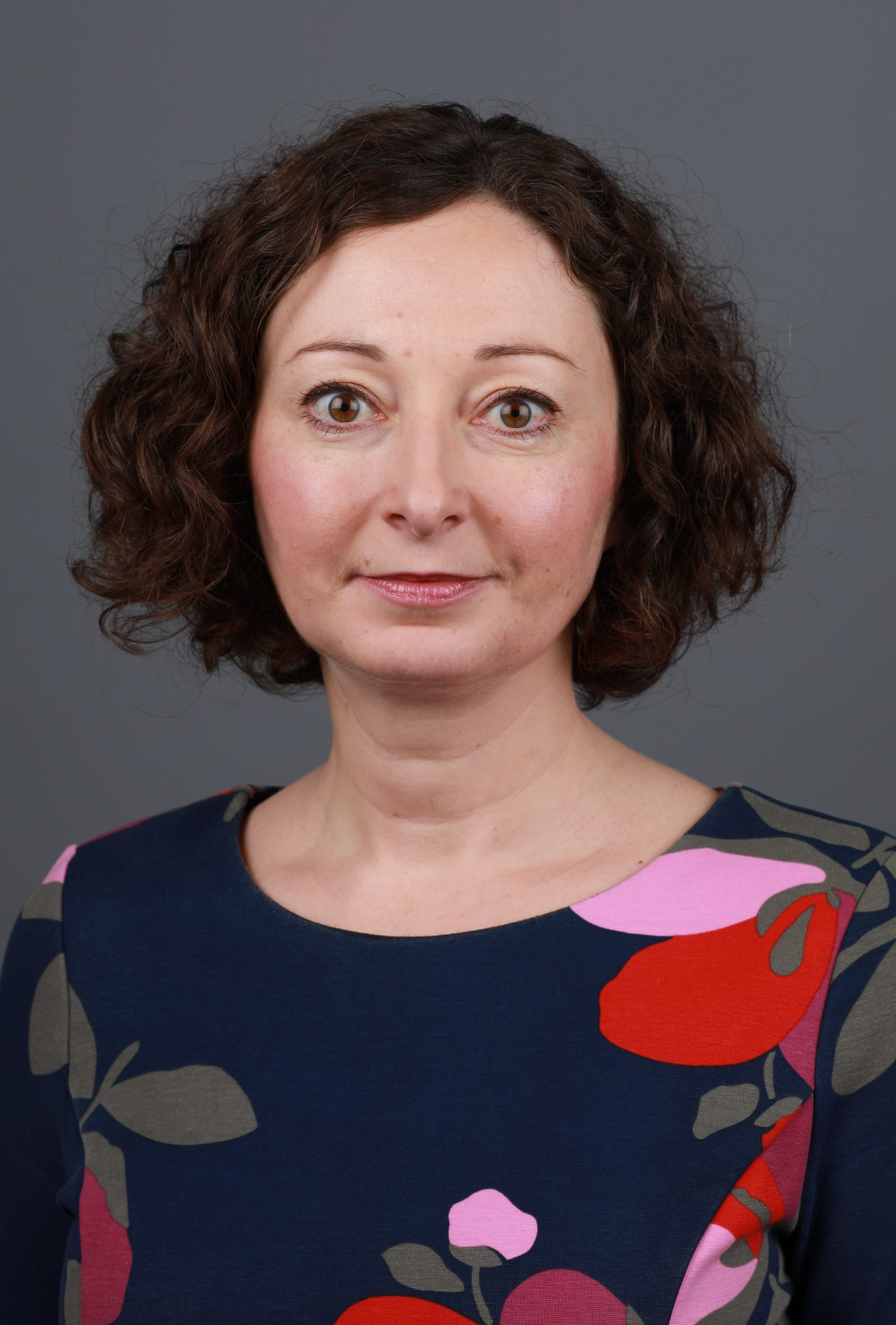 Ramona Pop (Bündnis 90/Die Grünen)